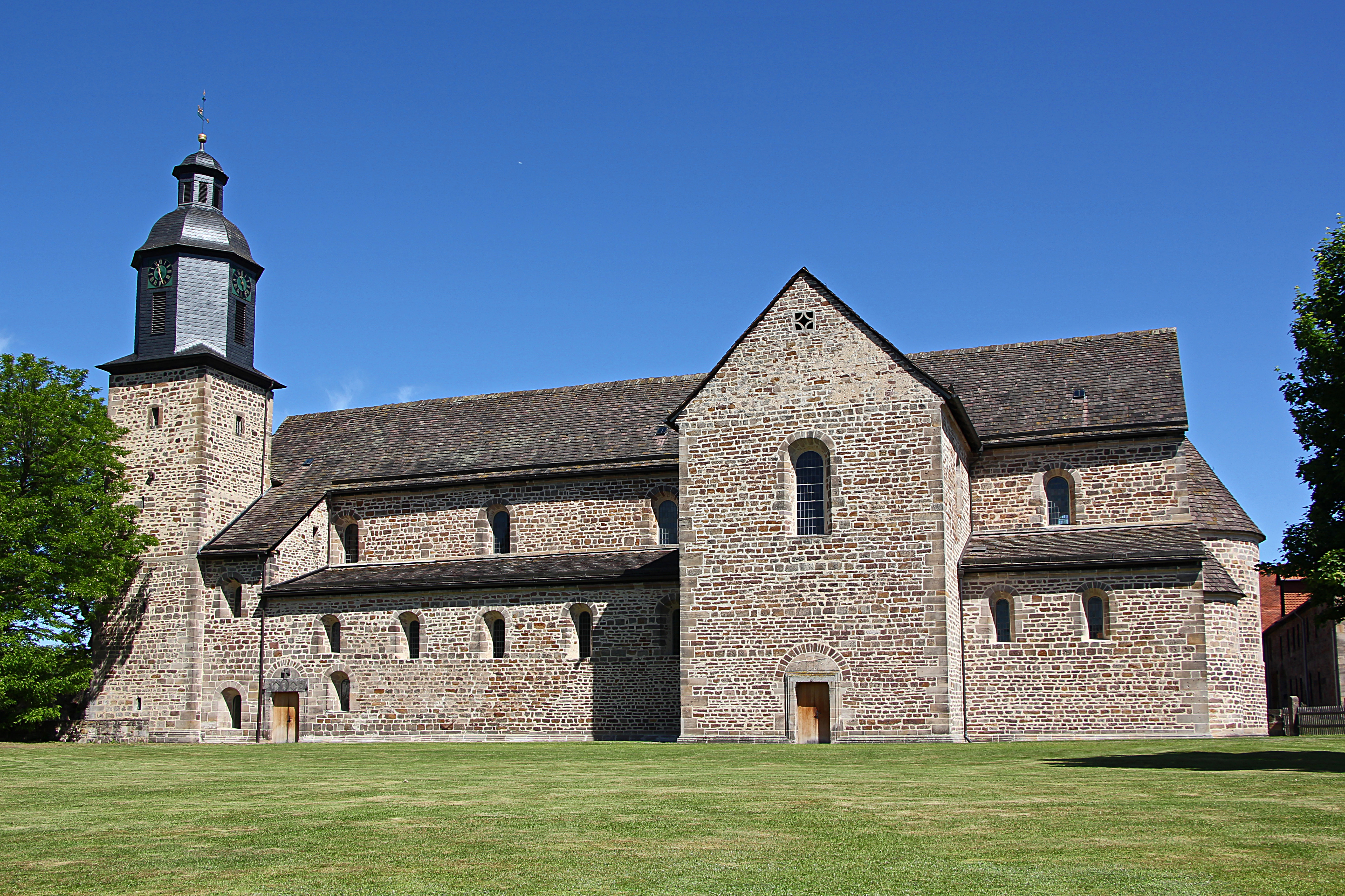 Kirche des ehemaligen Benediktinerinnen-Klosters Lippoldsberg. Ansicht von Süden.